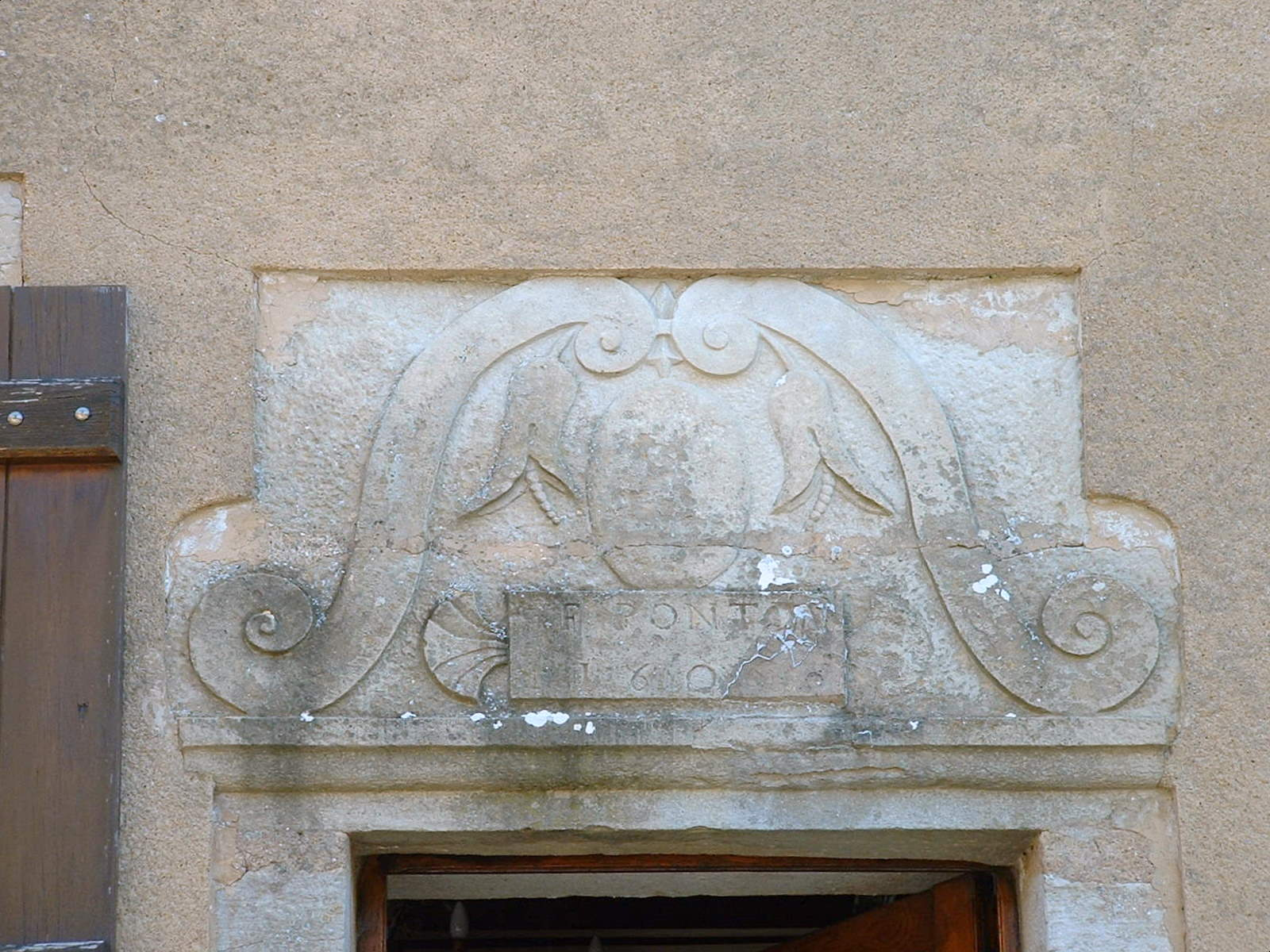 Montréal (Yonne) : maison ancienne